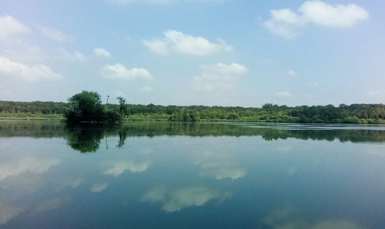 Etang de Virelles